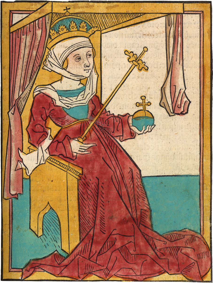 Chronica Hungarorum. EA. Brünn 1488